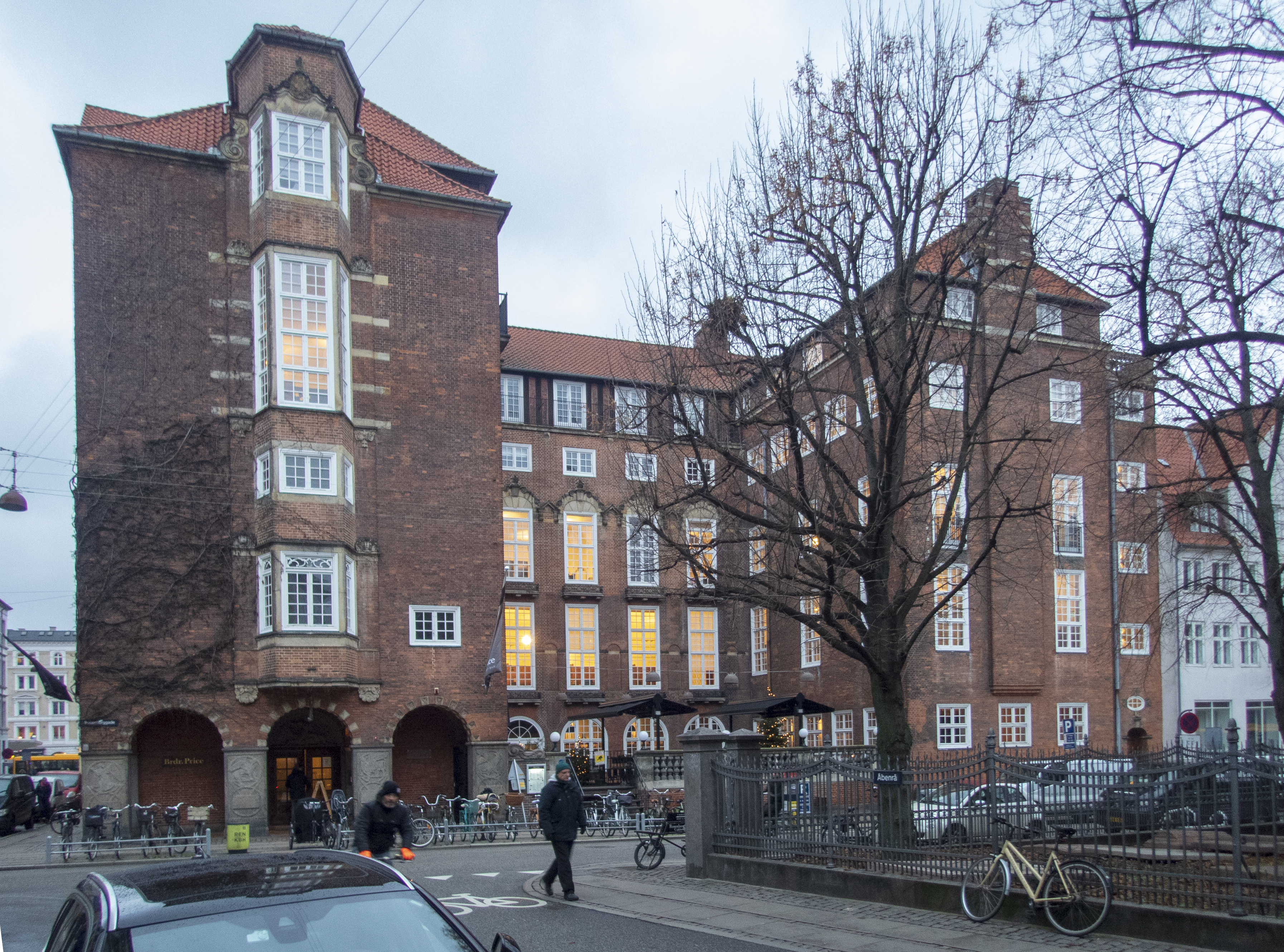 KFUM-borgen, Rosenborggade 15-17 Köpenhamn. Byggnadsår 1915-1917. Arkitekt Henning Hansen.